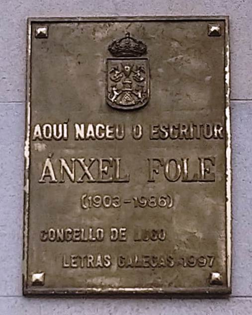 ver titulo